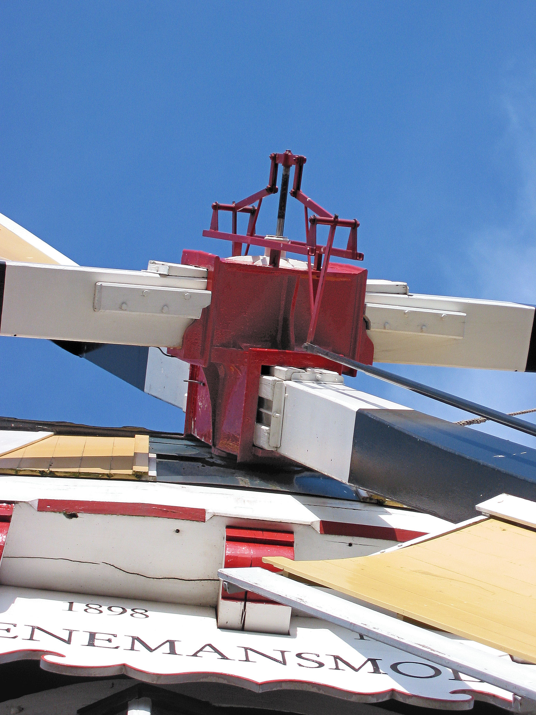 Spin van de Venemansmolen, Winterswijk, the Netherlands